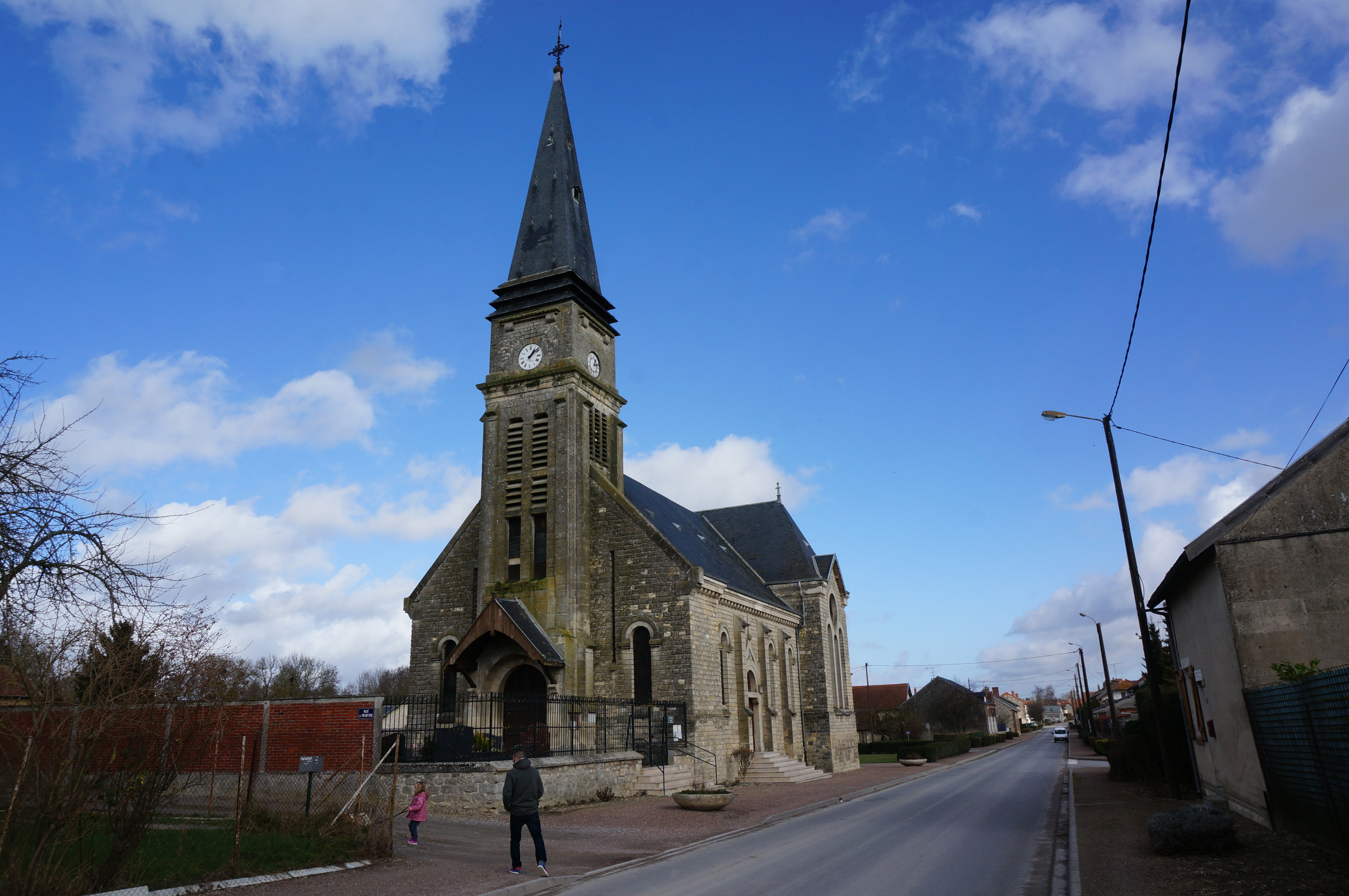 vue de Juvincourt-et-Damary.